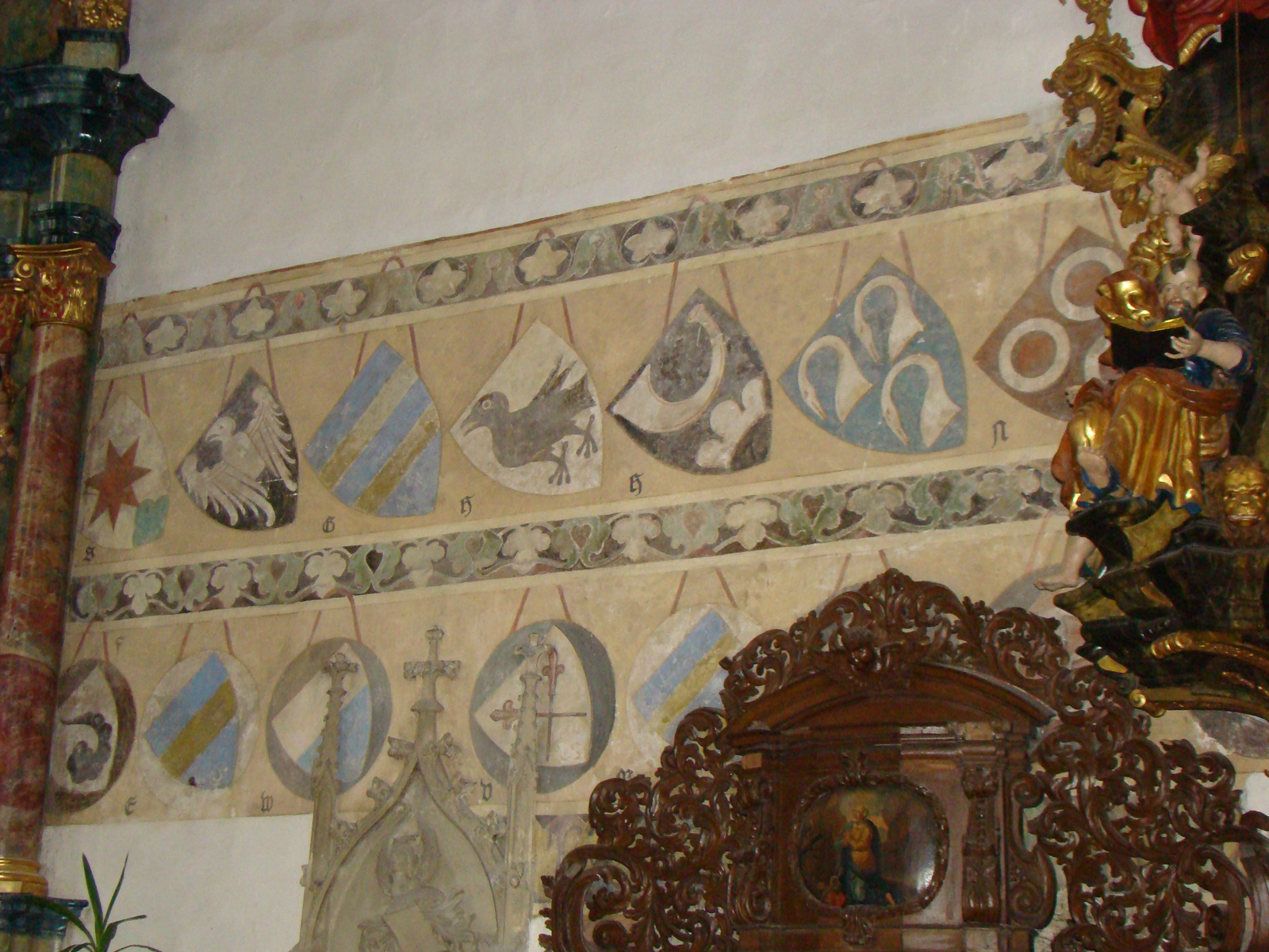 Dominikanerkirche Bad Wimpfen, Wappenfries, Rest der ursprünglichen Ausmalung